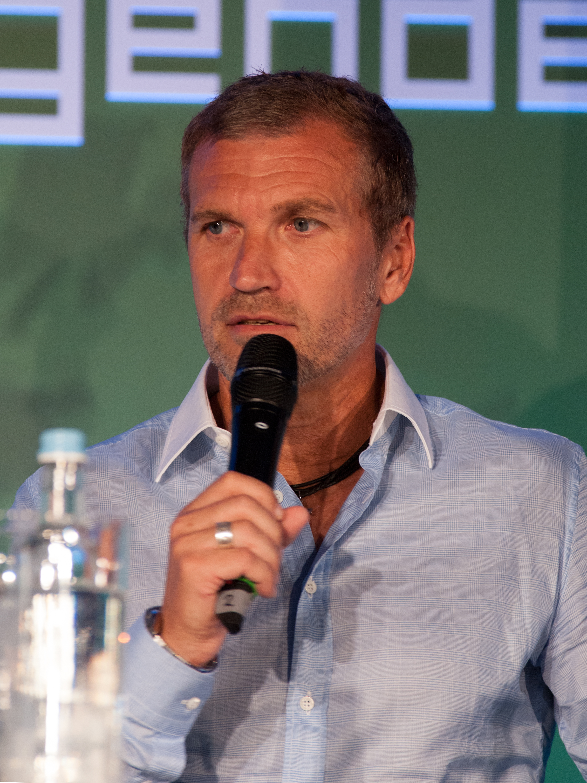 Pressekonferenz zum 10. Tag der Legenden im Hotel Le Royal Méridien